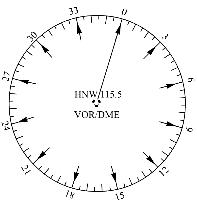 selbst gezeichnet